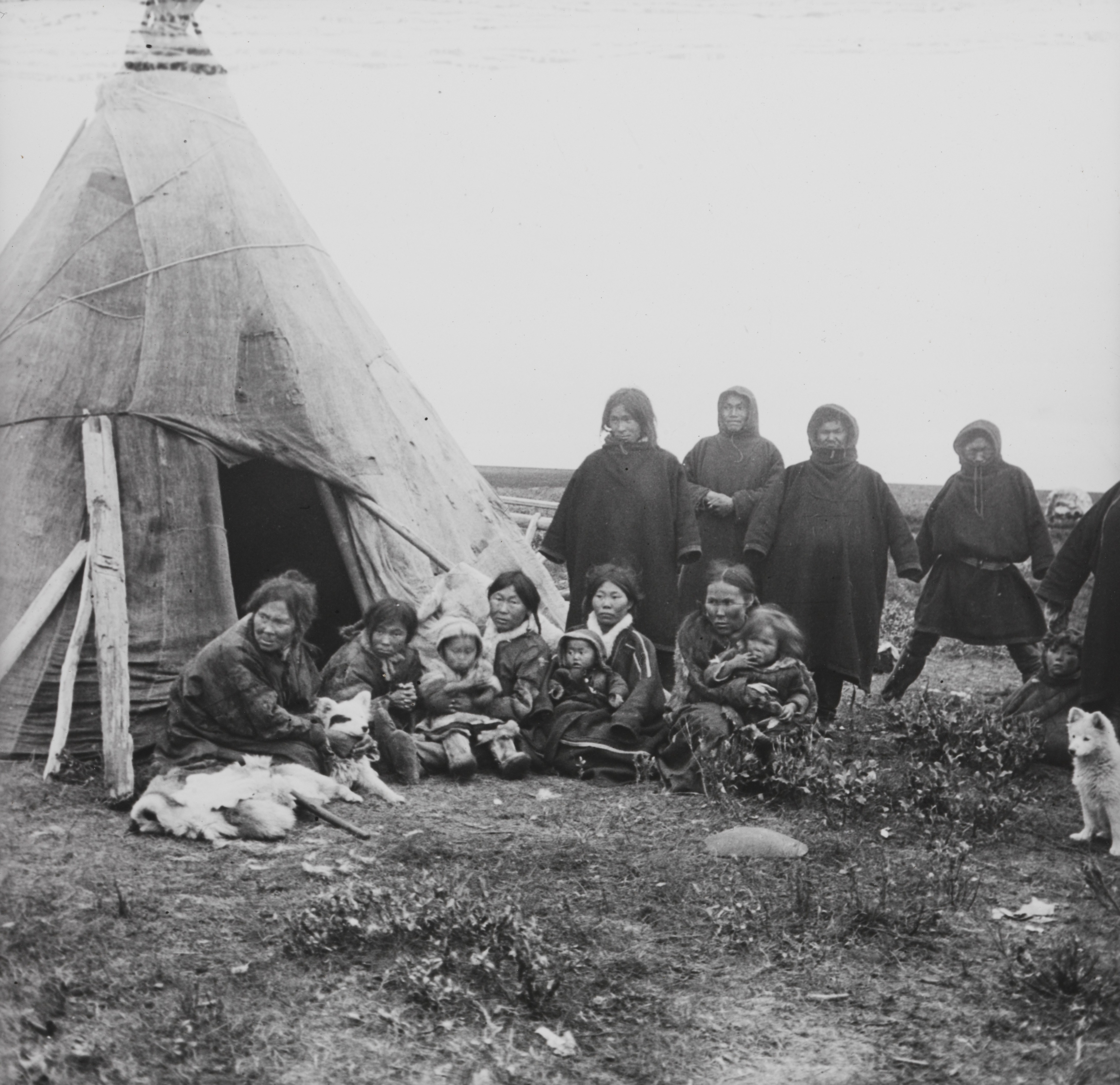 Nentse (entse) (folkegruppe) kvinner, barn og menn samlet ved et telt. En av kvinnene holder en hund om halsen. Ett av bildene fra reisen til Sibir i perioden 2. august-26. oktober 1913. Fridtjof Nansen startet sin transsibirske reise med et handelsskip fra Oslo til Jenisej. Ferden gikk gjennom deler av nordøstpassasjen som skulle åpne for en kortere handelsforbindelse mellom Vest Europa og Det Fjerne Østen. Depicted place: Russland, Nosonovskij Pesok